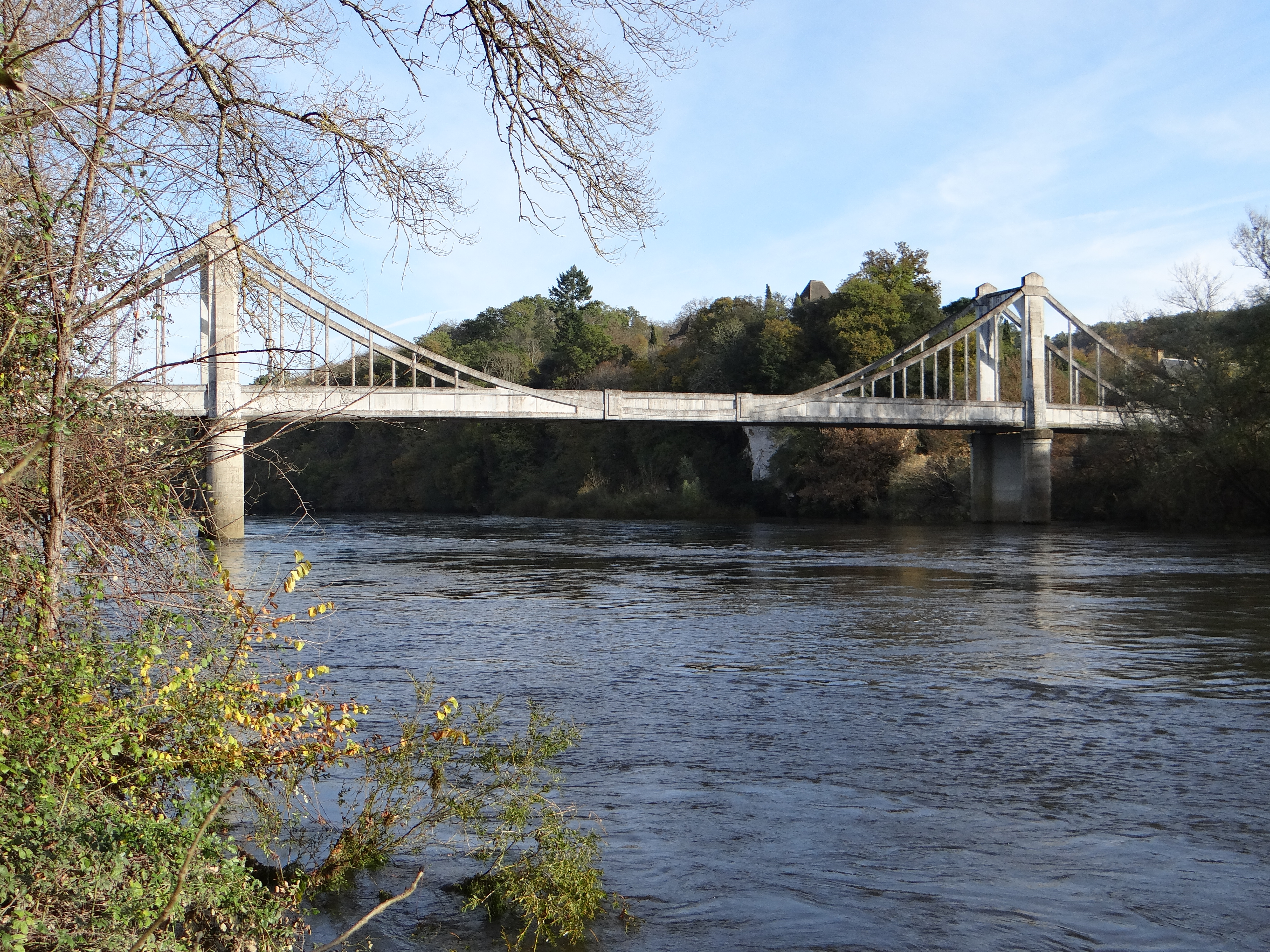 Pont de Groléjac - Ensemble du pont sur la Dordogne, côté aval